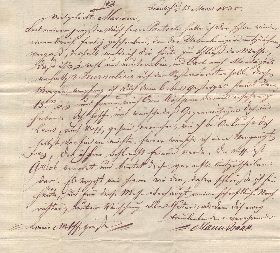 Brief zum Ende der Frankfurter Messe von Isaac Mann an seine Frau nach Berlin, Datum 13. März 1835 Vielgeliebte Mariam, Seit meinem jüngsten durch herrn Paetsch hatte ich dir schon wieder/ einen brief fertig geschrieben den der Ueberbringer mitzunehmen/ vergaß, deshalb melde (?) ich dir heute zum Schluß der Messe,/ daß ich [?...hebräische Schreibschrift, evtl. Buchstaben ה und ג?] wohl und munter bin, und(?) Carl mich Montag(?) nachmttg (?)[?....] Journalière auf der Post(?) abwarten(?) soll. Diesen/ Morgen empfing(?) ich auch dein liebes(?) Gestriges samt den/ 15. [?....] und freue mich dein Wohlsein daraus ersehen(?) zu/ haben. Ich hoffe(?) und wünsche, daß Gegenwärtiges dich und/ Louis(?), auch [?....], gesund erreichen, wie ich bei Ankunft dich/ selbst vorfinden möchte. Ferner wünsche ich eine(n) vergnügte(n)/ פורים (=Purim), den ich hier wohl nicht feiern werde. Die Messe ist/ Gottlob beendet und bietet(?) diese(?) gar nichts mitzutheilen(?)/ dar. Es ergeht mir hierin wie dir, daher schließe ich für/ heute und für diese Messe überhaupt meine schriftliche(n) Nach-/ richten, unter Wünschung alles Guten, der dein dich ewig/ treu liebender verehrender/ Mann Isaac/ Louis [?....] grüße(n)